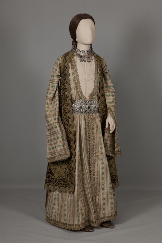 Αστική φορεσιά Ιωάννινα, Ήπειρος. Μέσα 19ου αιώνα Συλλογή Πελοποννησιακού Λαογραφικού Ιδρύματος, Ναύπλιο